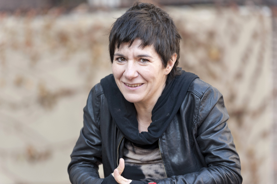 18è Mercè Rodoreda de contes i narracions_Empar Moliner_Tot això ho faig perquè tinc molta por_Foto Òmnium Dani Codina BAIXA RES 65a Nit de Santa Llúcia Tortosa ha acollit la nit de les #lletrescat de l'any 2015.